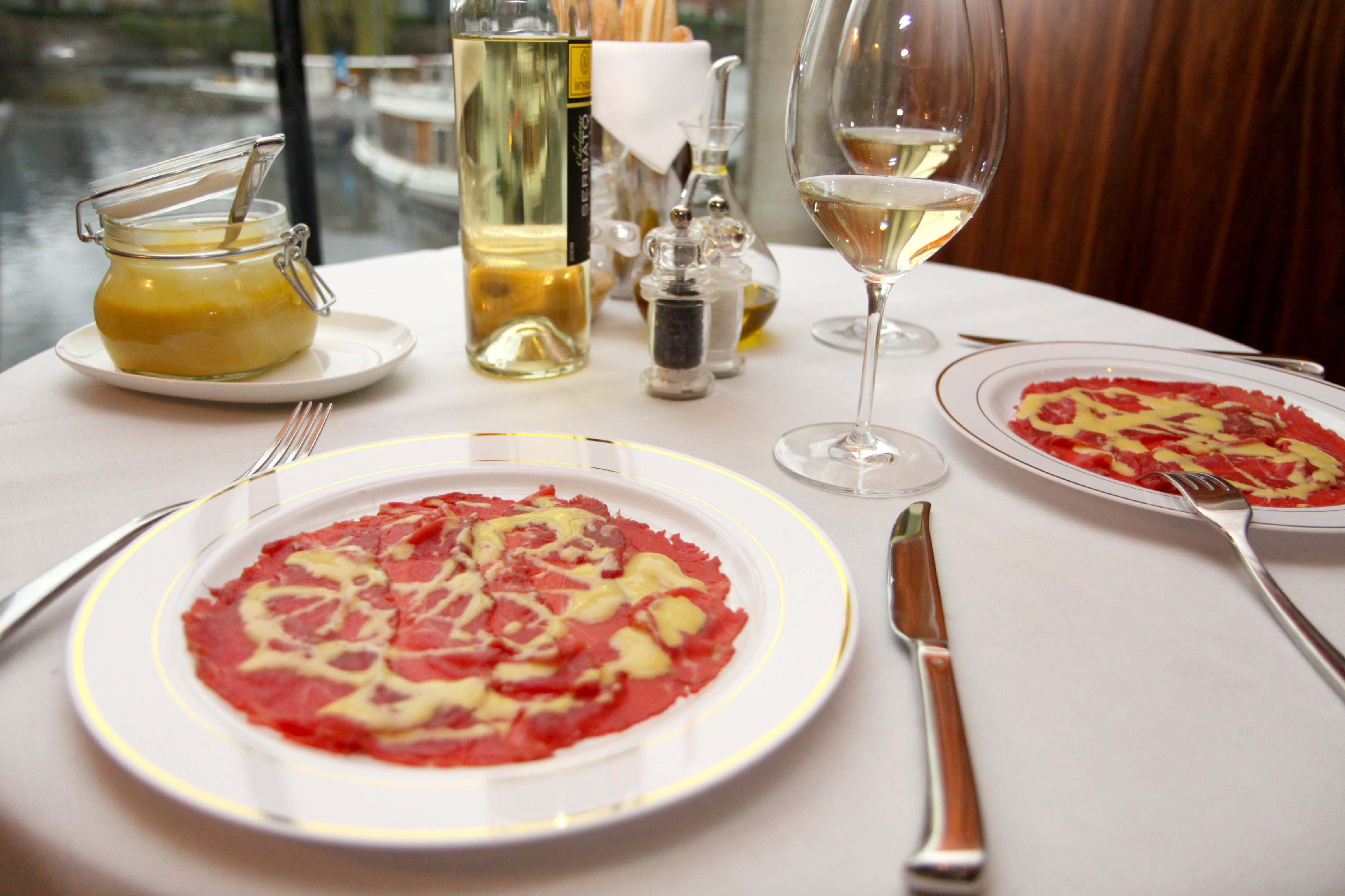 Carpaccio